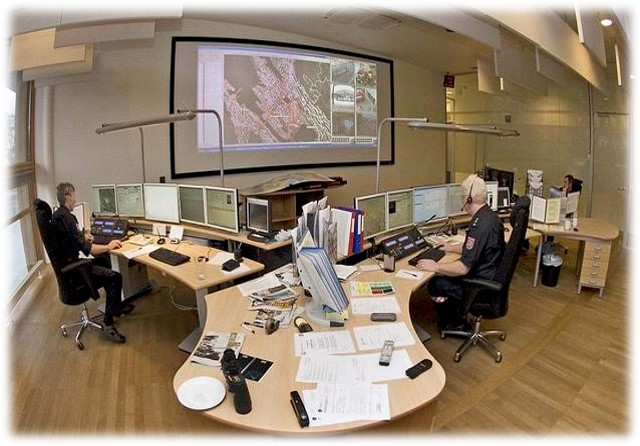 110 Hordaland